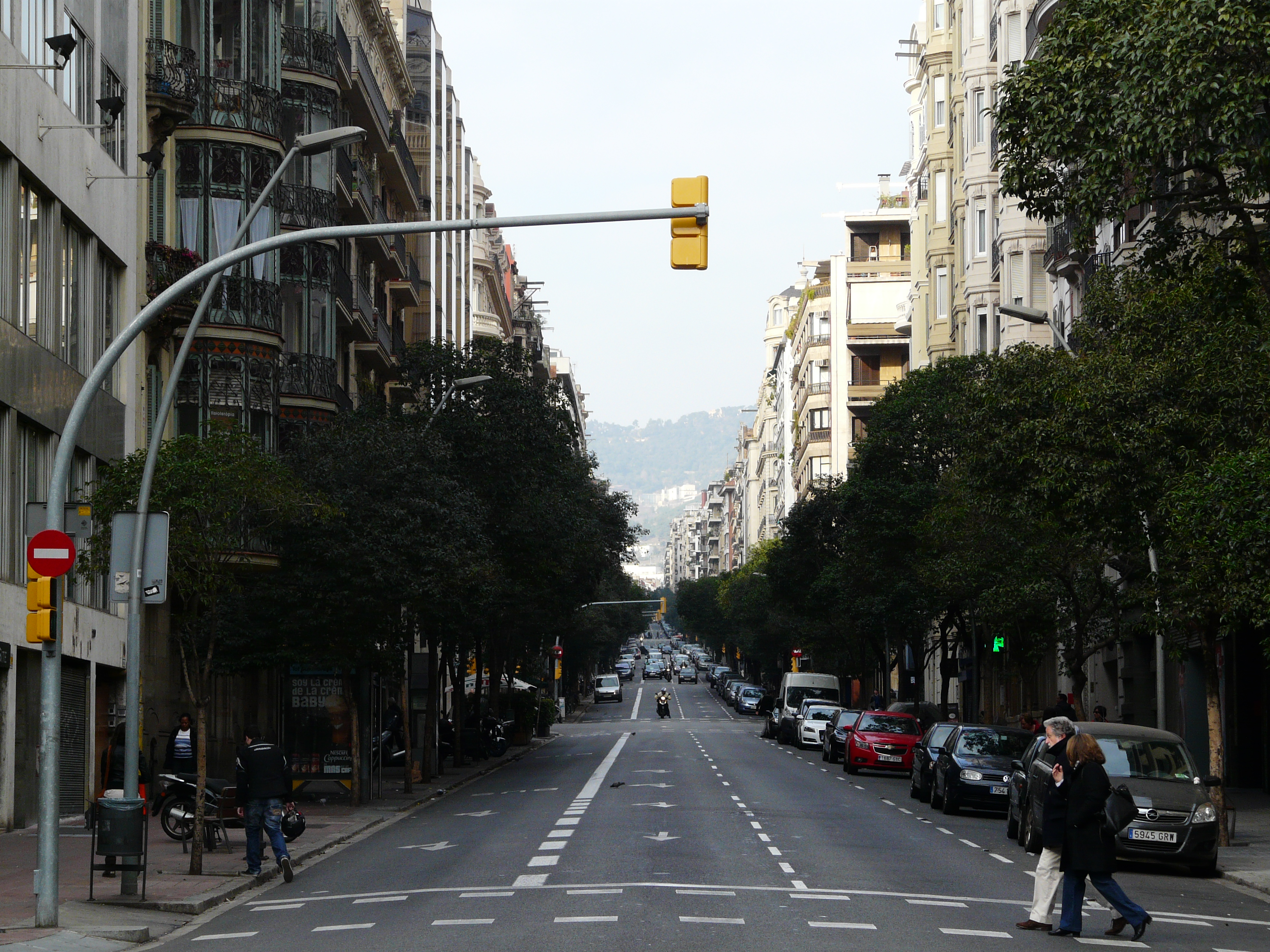 El carrer Muntaner vist des de la Diagonal, amb la Casa Parés de Plet a l'esquerra. C/ Muntaner, 231 (Barcelona). Object location41° 23′ 40.25″ N, 2° 08′ 55.63″ E